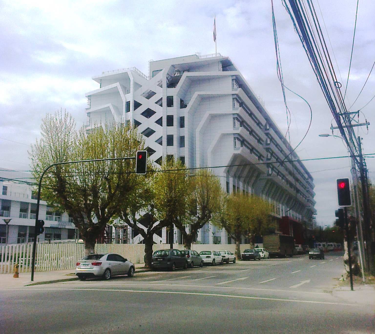 Nuevo edificio del Hospital Regional de Talca